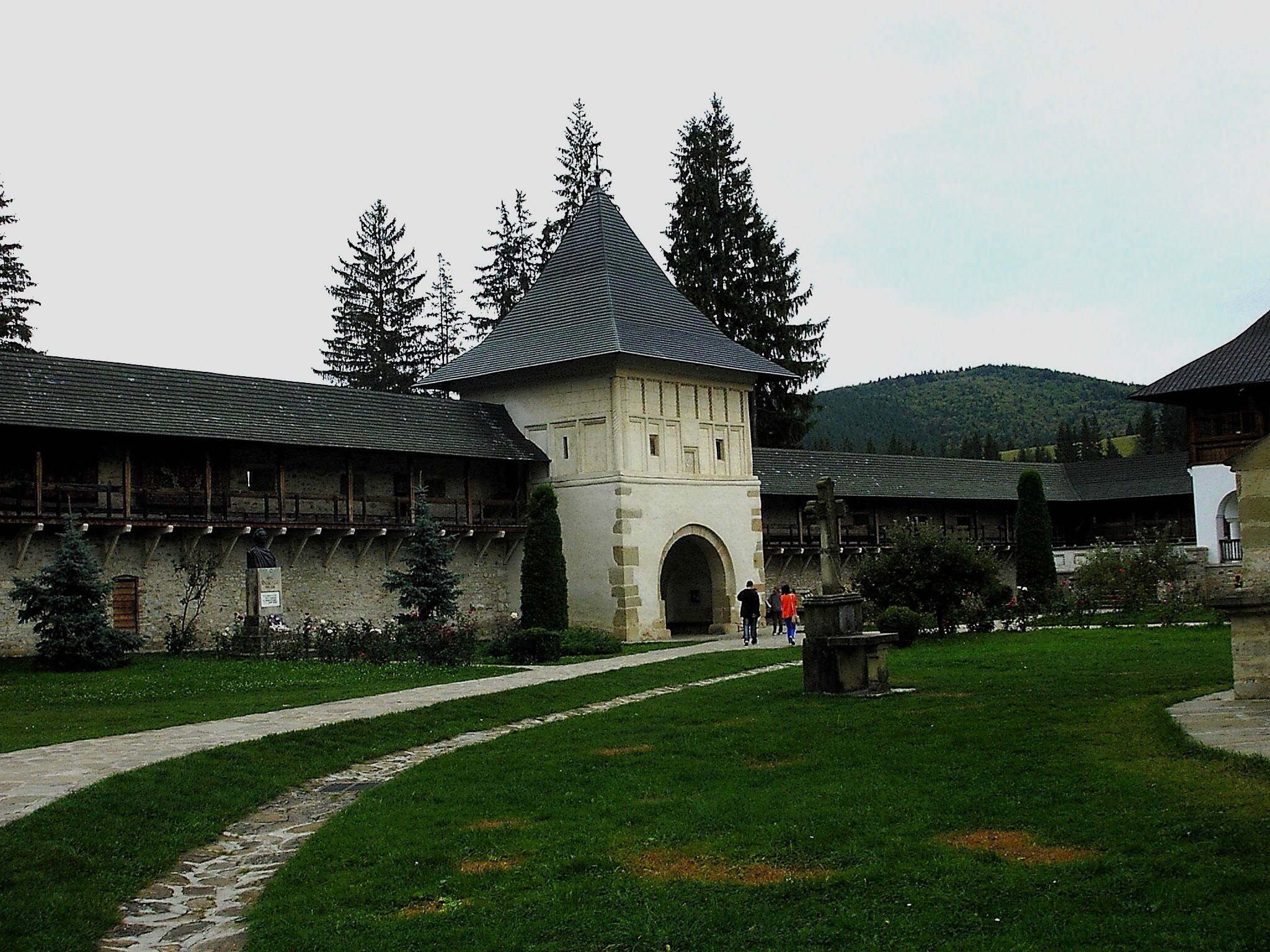 Putna, Románia: a kolostorépület